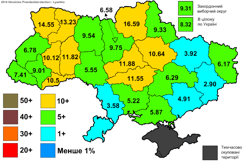 Електоральна підтримка Ляшка Олега Валерійовича на виборах Президента України 2014.